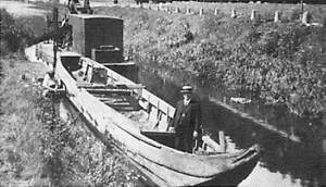 Image ancienne (XIXe siècle)à importee de Catégorie:Image maritime